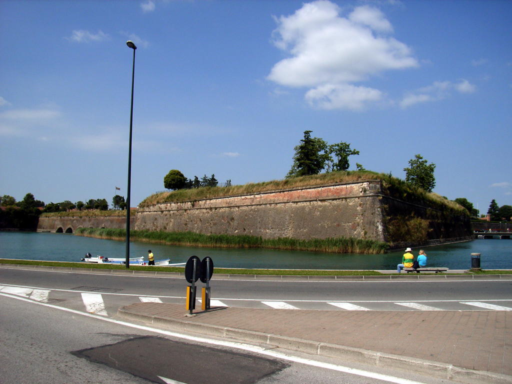 Peschiera del Garda, Veneto, Italia